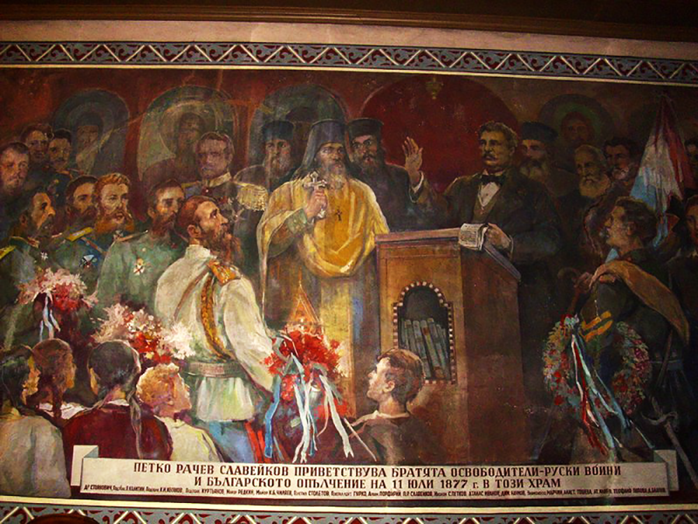 Стенопис от старозагорския храм "Свети Димитър"-старозагорският кмет Петко Славейков приветства в Ст.Загора руските войници на 11/23 юли 1877 г